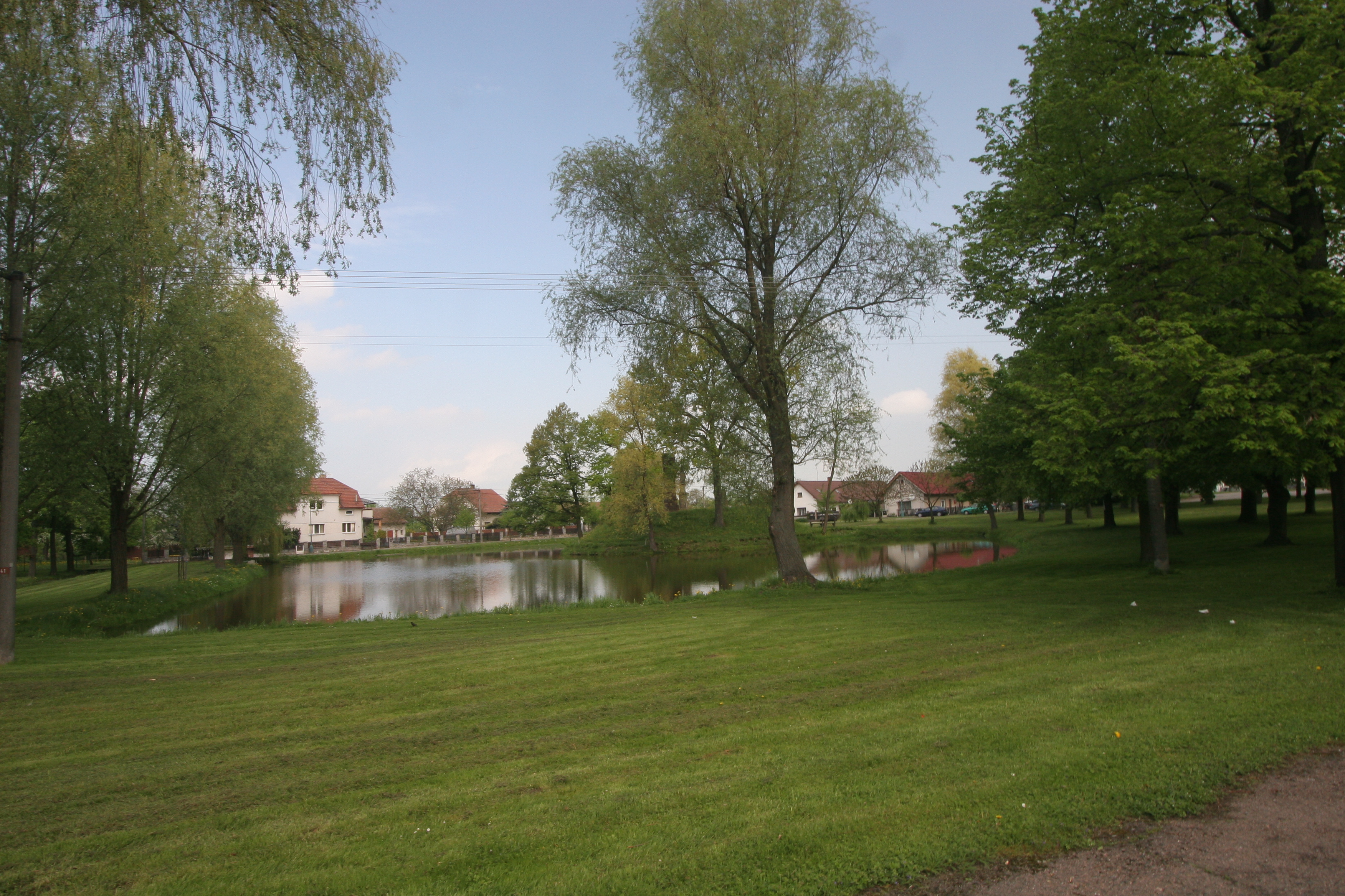 Obědovice náves